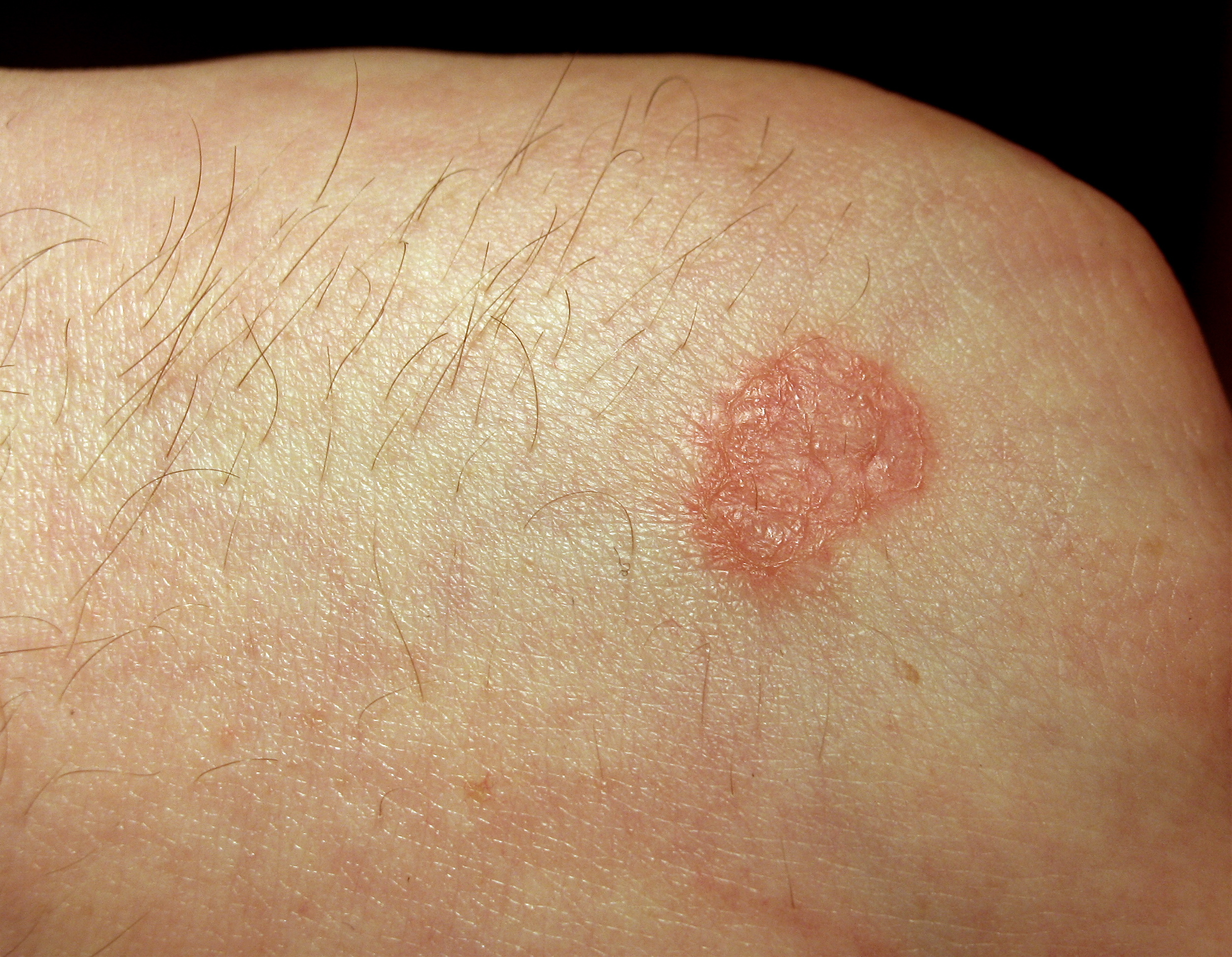 Oberflächlicher Hautpilz (li. Handrücken)